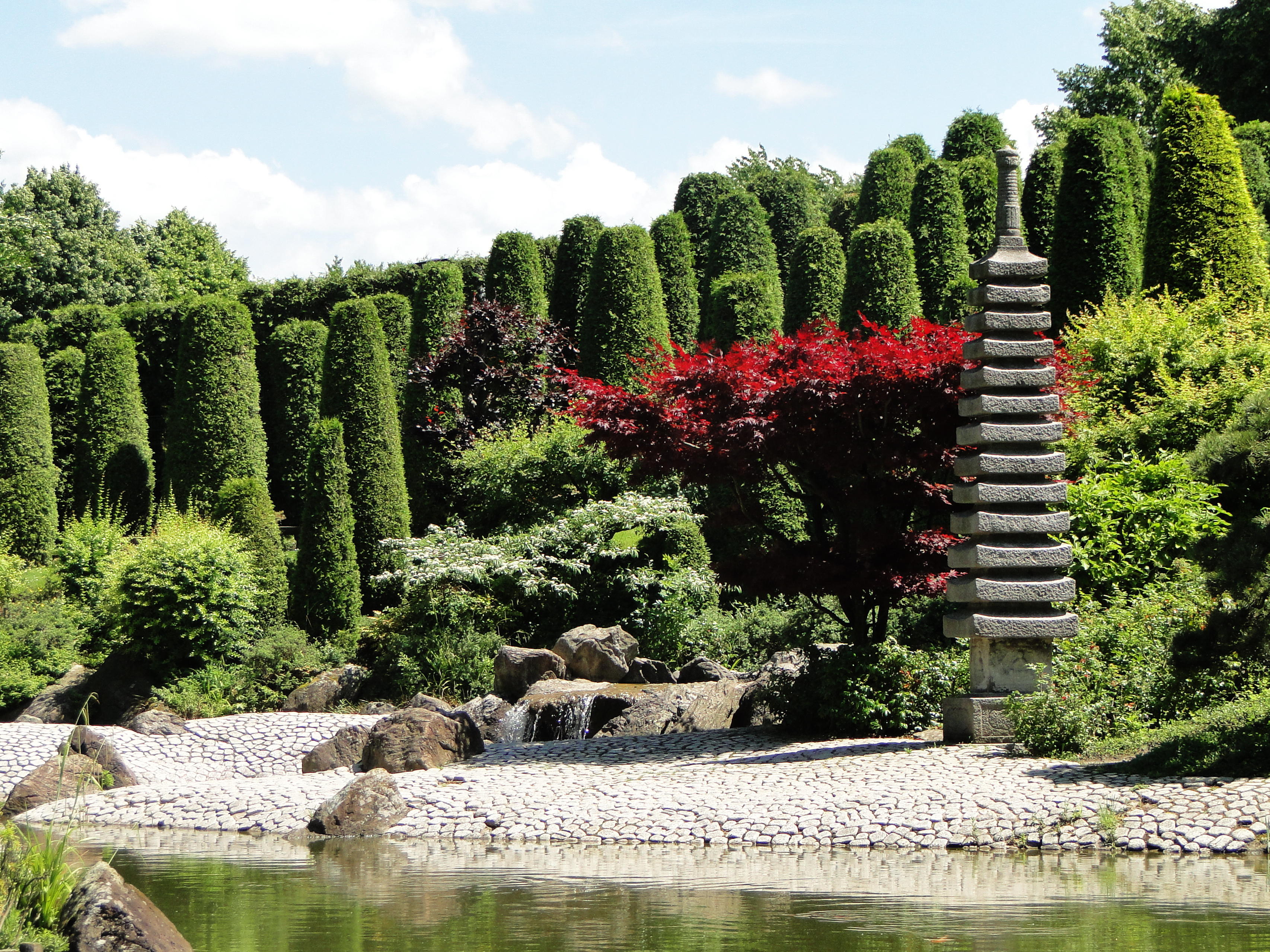 Japanischer Garten in der Bonner Rheinaue; Pagode